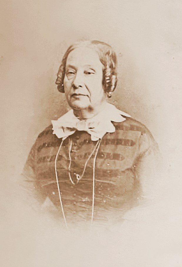 Baronesa de Sorocaba - Fotografia do sÃ©culo XIX - Original da ColeÃ§Ã£o Waldyr Cordovil Pires - Rio de Janeiro